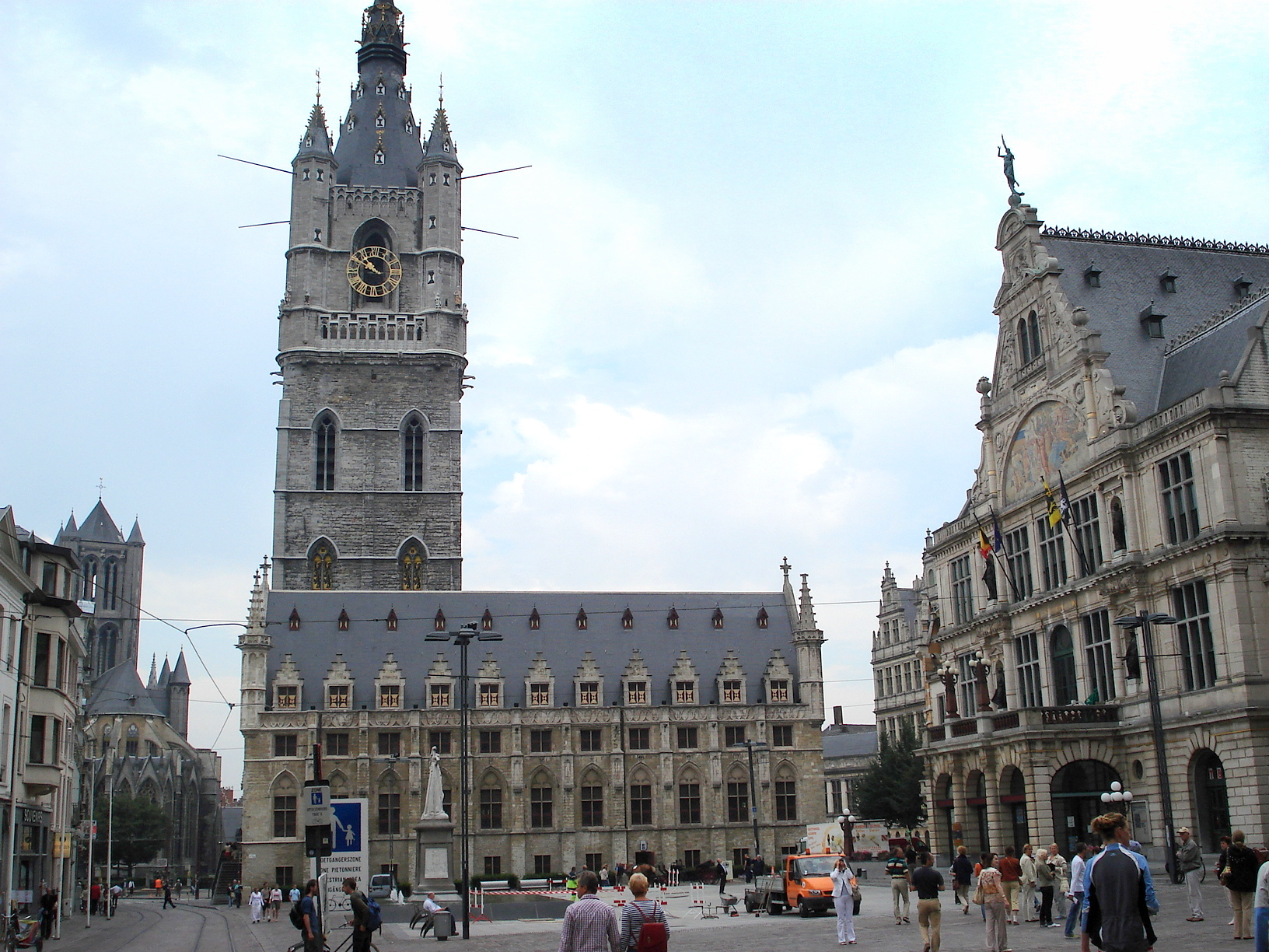 Belfort van Gent / Beffroi de Gand